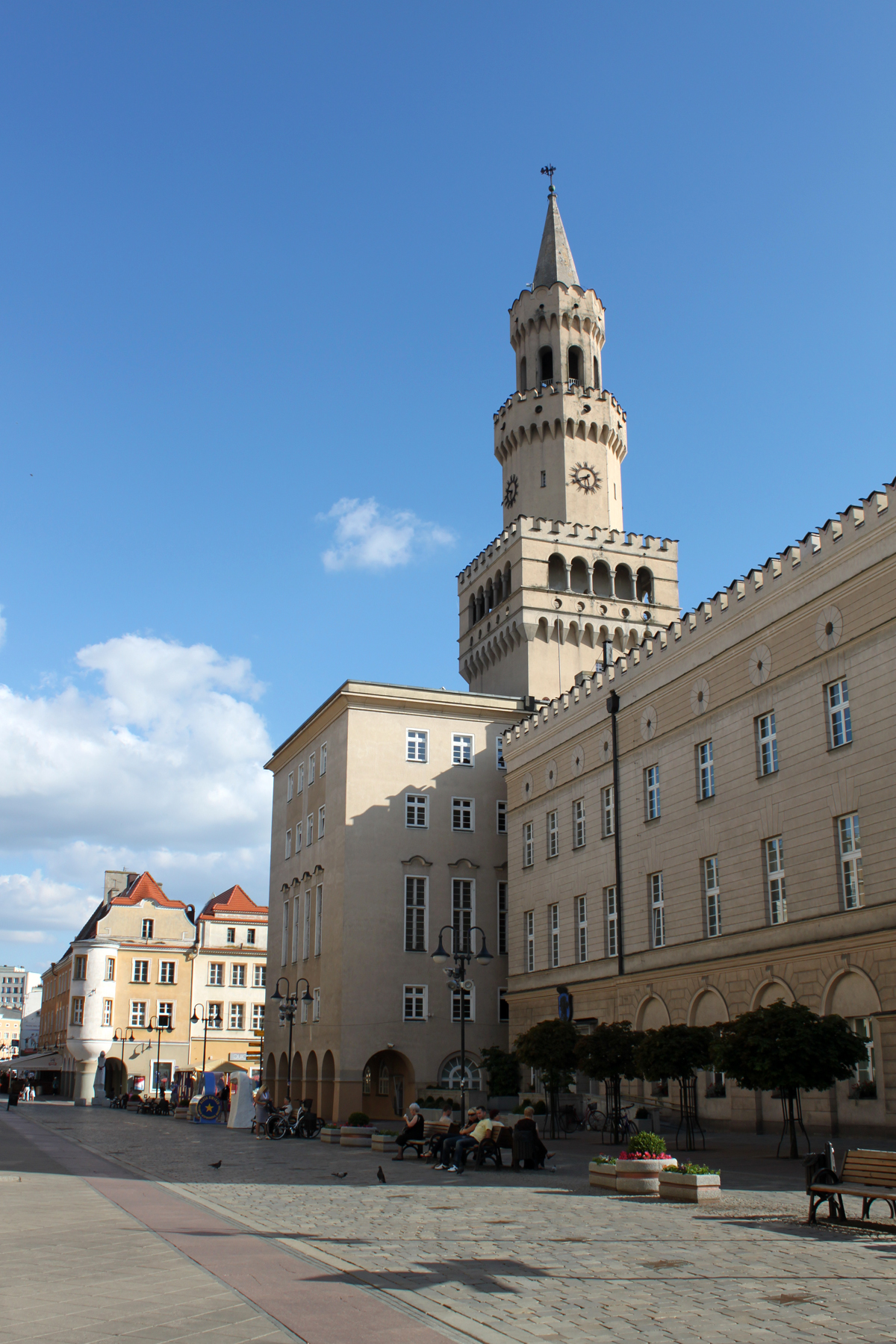 Widok na wejście do budynku.